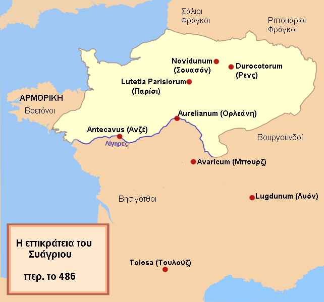 Το βασίλειο του Συάγριου (486)